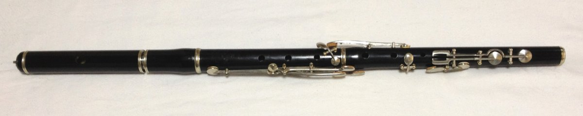 メイヤー式フルート Nach H.F.Meyer (Made in Saxony)